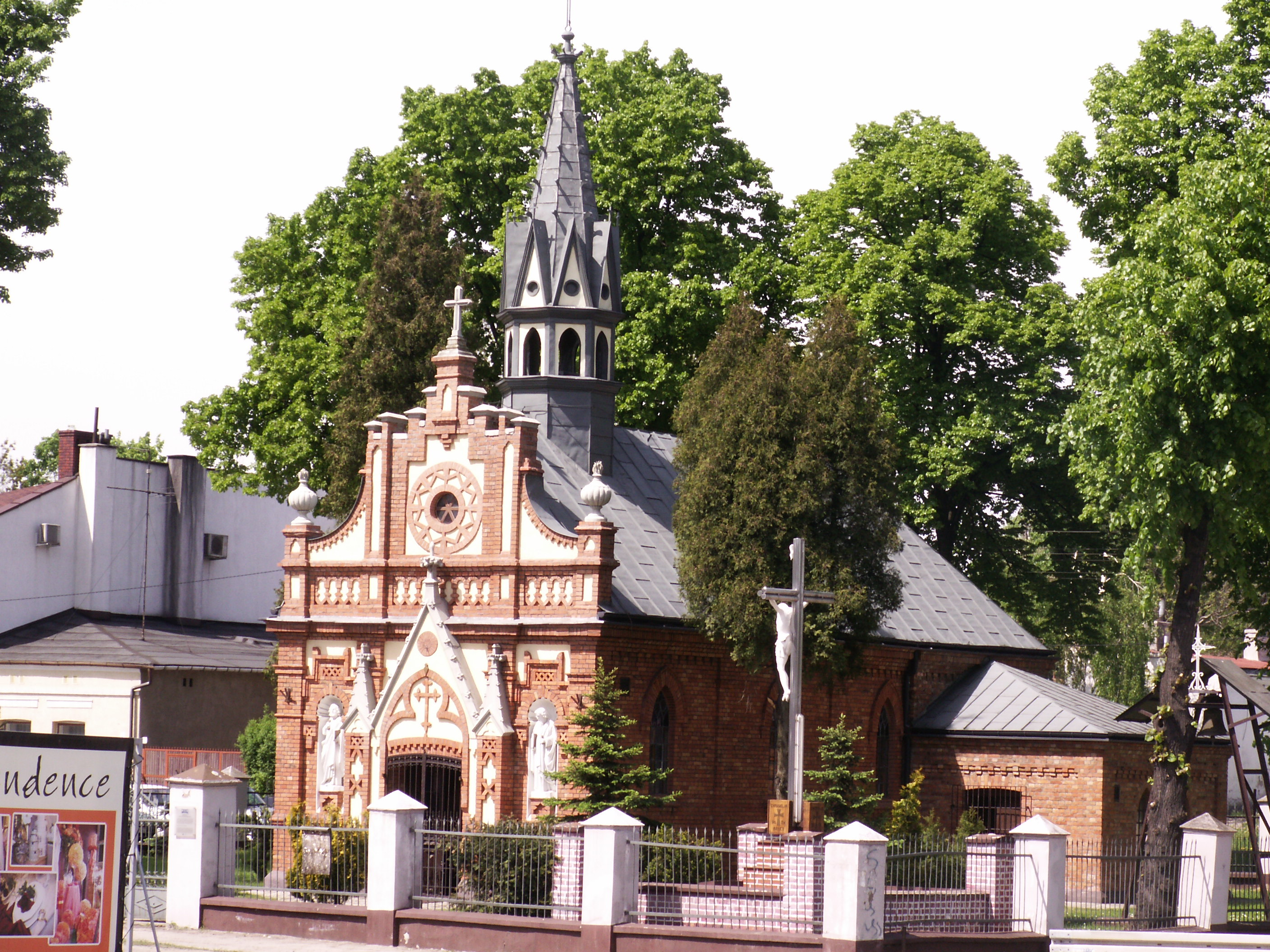 Kościół parafialny pw. Pana Jezusa Konającego w Częstochowie. Widok z Rynku Wieluńskiego.